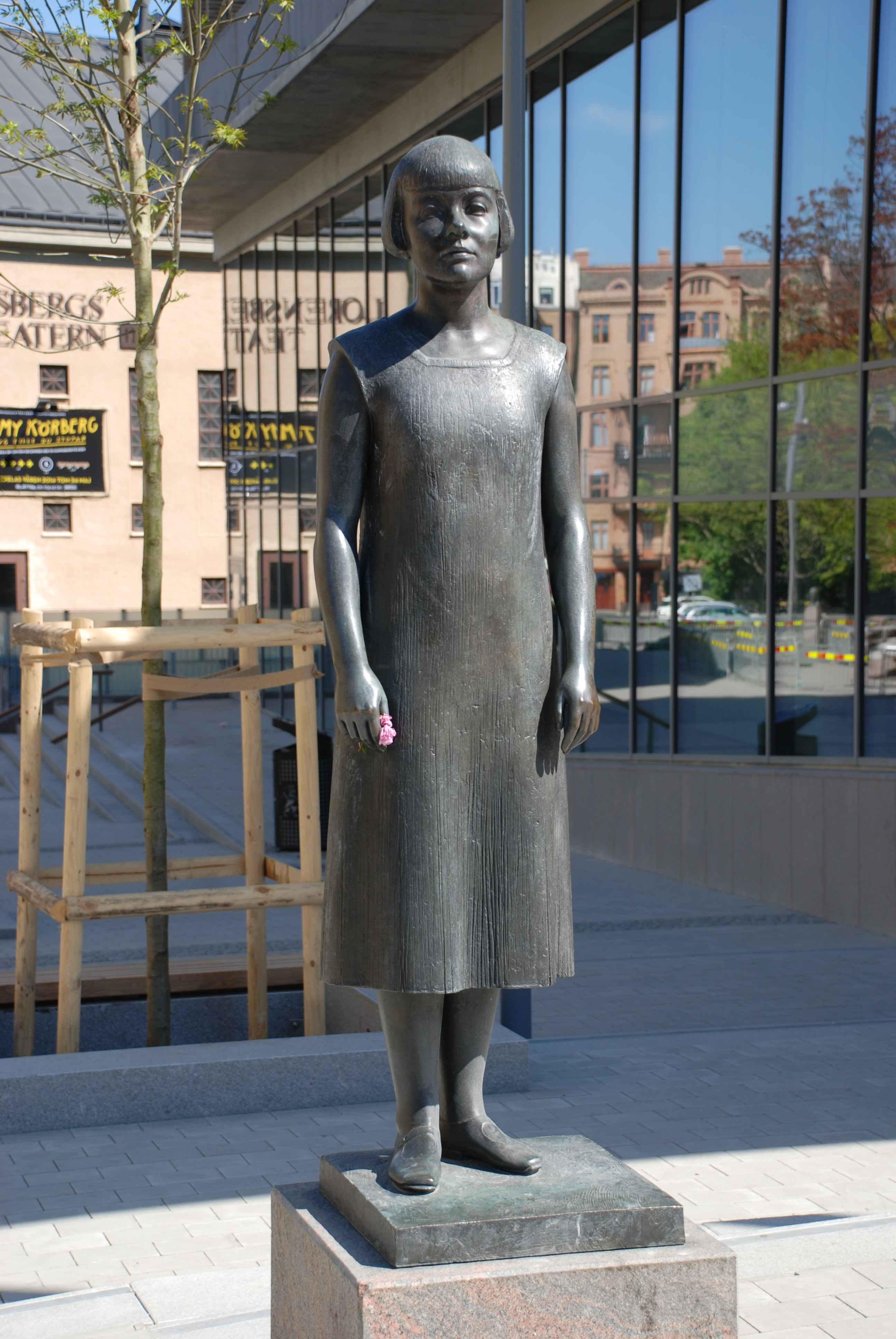 Karin Boye-statyn av Peter Linde på sin nya plats efter Stadsbibliotekets ombyggnad (2014). Statyn invigd 1987.